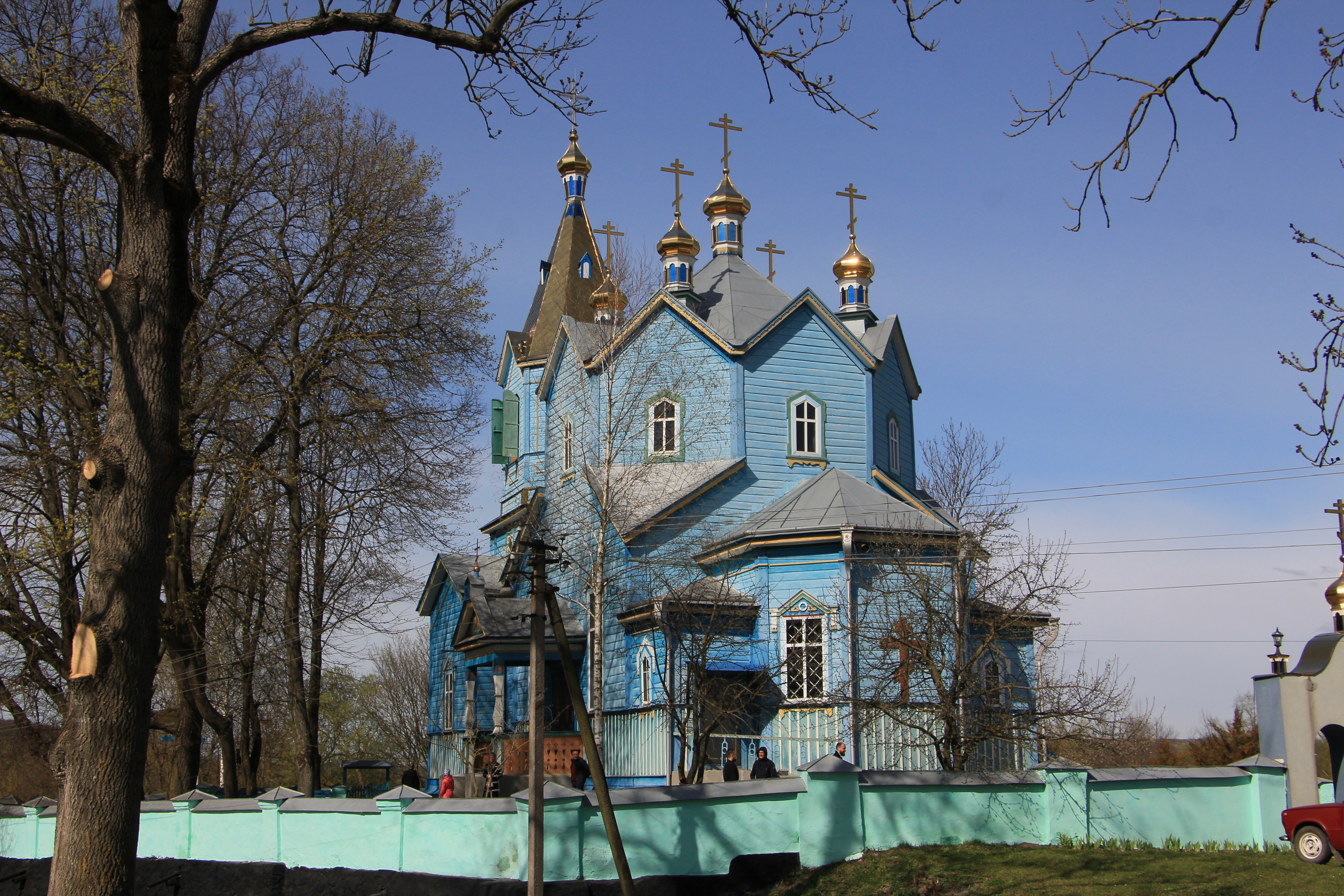 Дерев'яна церква в селі Бодаки, Збаразького району, Тернопільської області